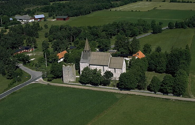 Gammelgarn kyrka och kastal. Motiv: Gammelgarns kyrka Nyckelord: Flygbilder, Riksintressen Kategori: KyrkomiljöGammelgarn kyrka och kastal.